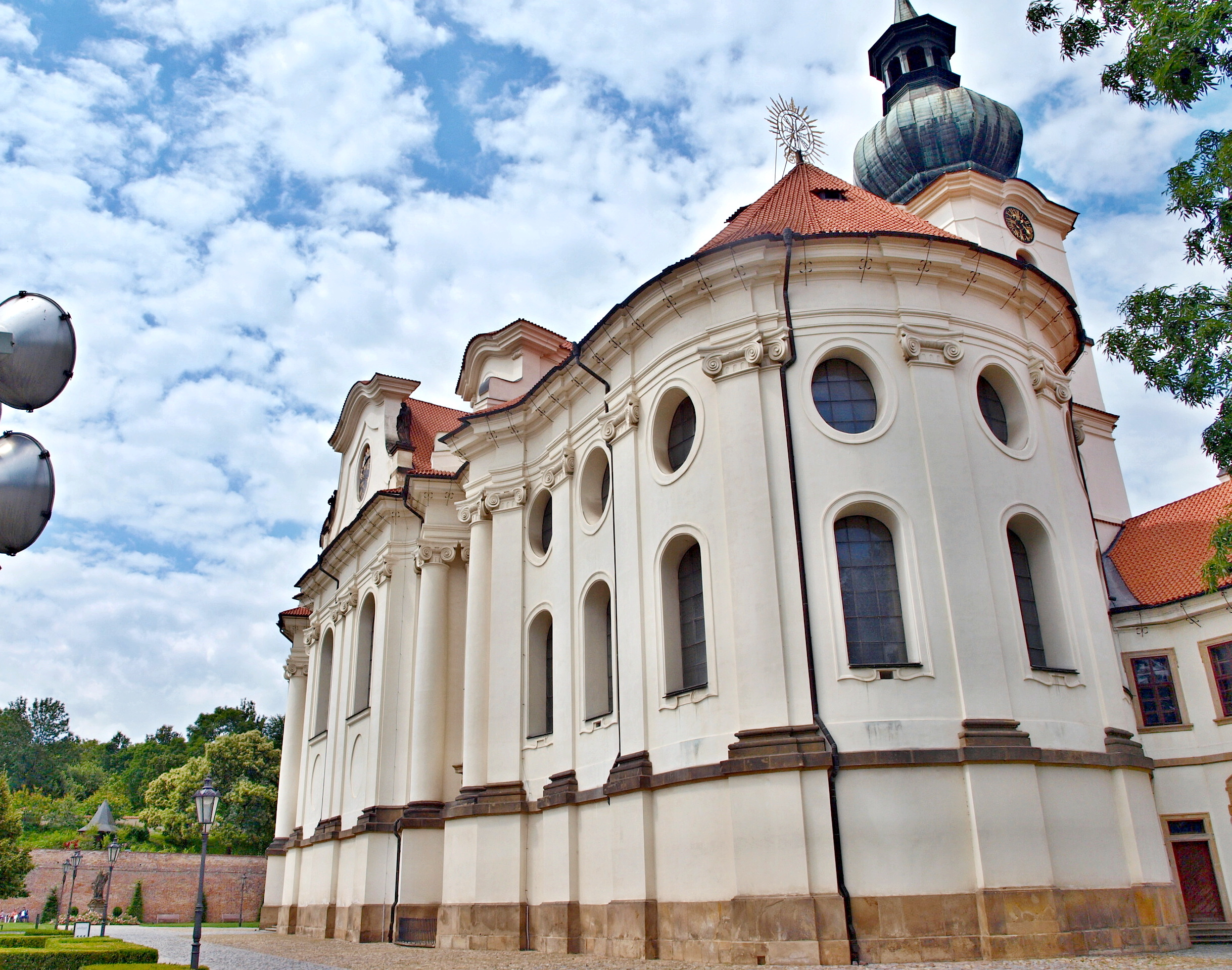 Břevnovská klášterní bazilika sv. Markéty